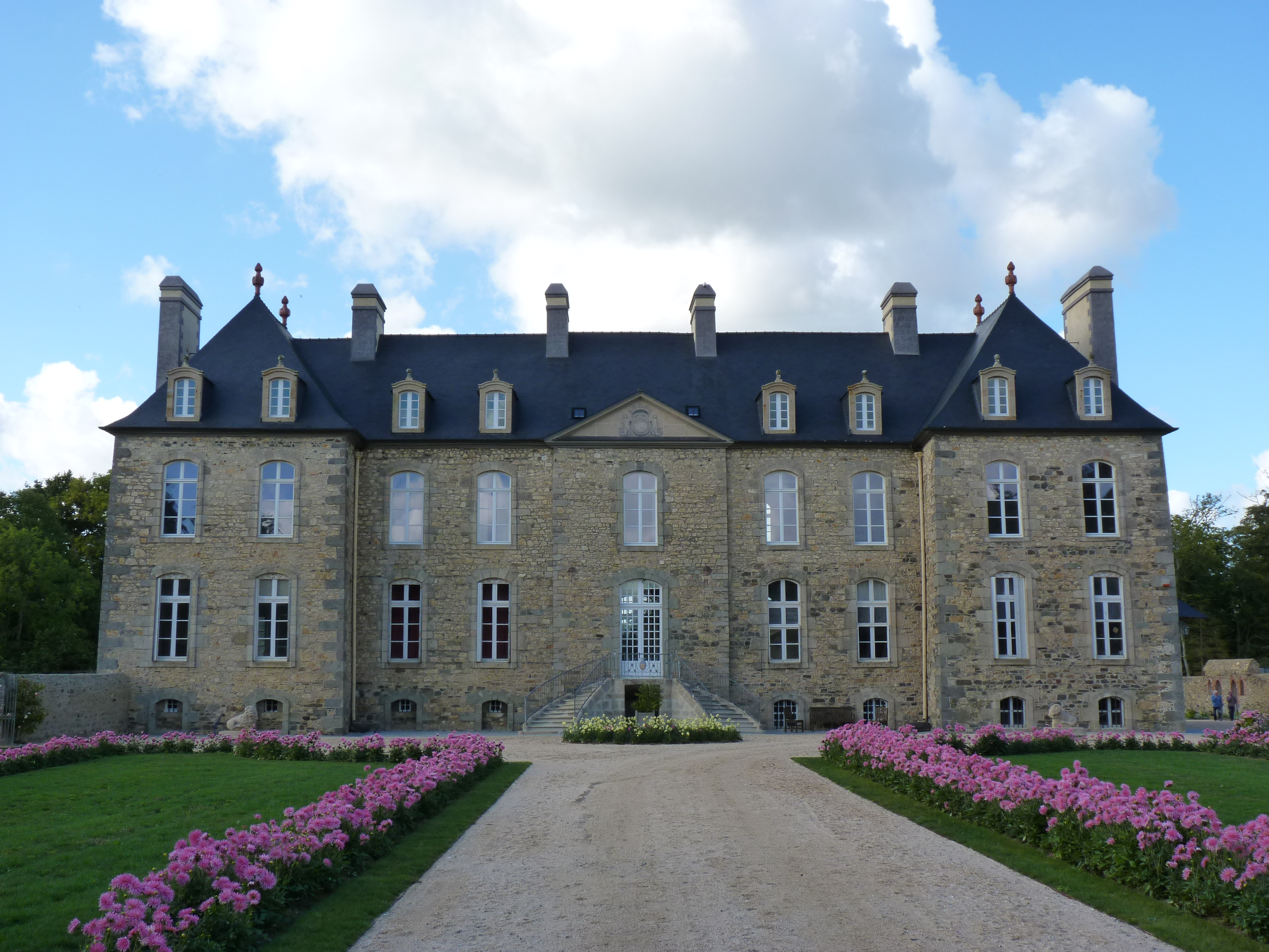 Château du 17ème siècle. Façade.